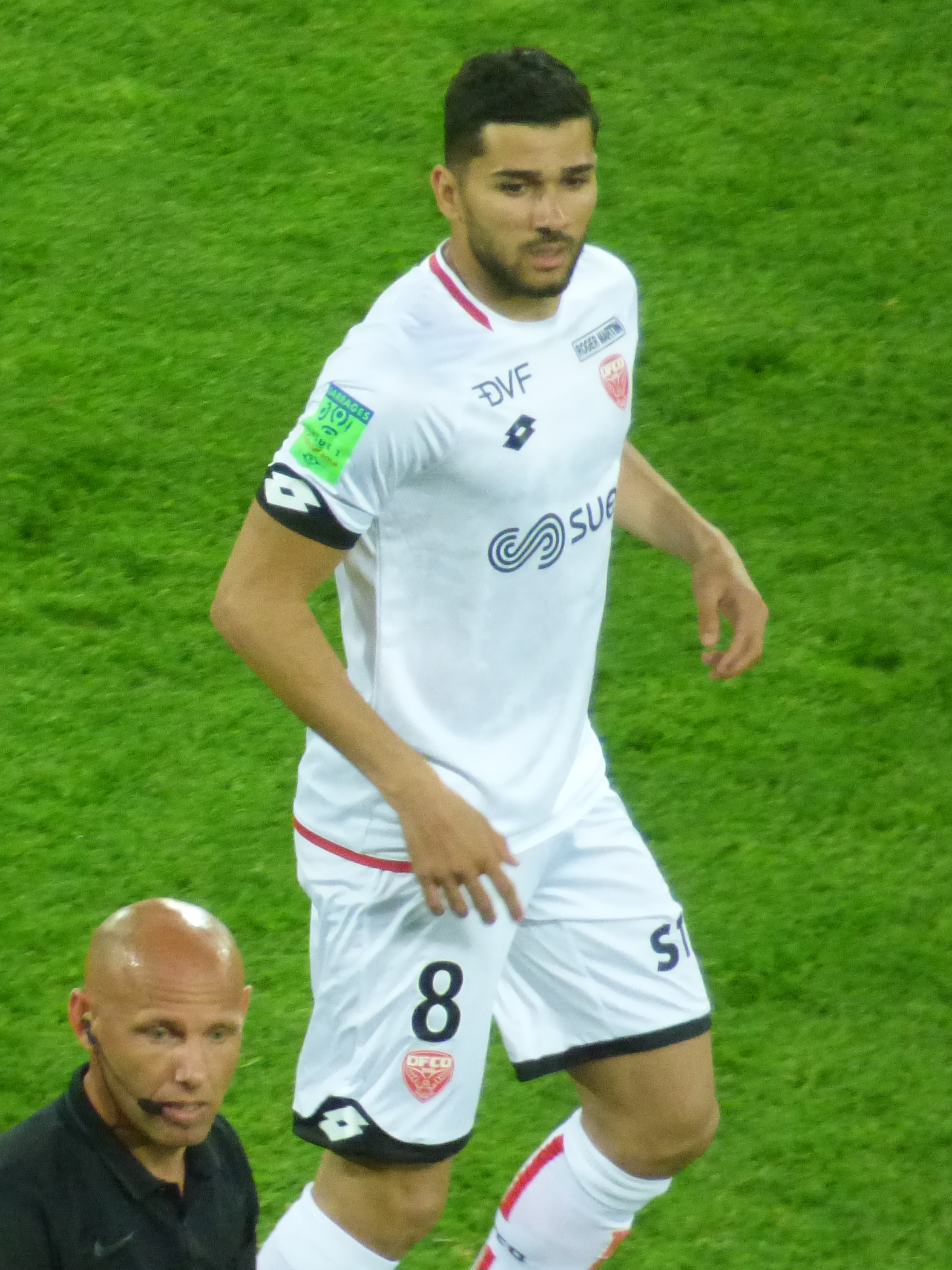 Mehdi Abeid pendant le match RC Lens / Dijon FCO, match aller des barrages pour la montée en Ligue 1 2018-2019, le 30 juin 2019, au Stade Bollaert-Delelis.